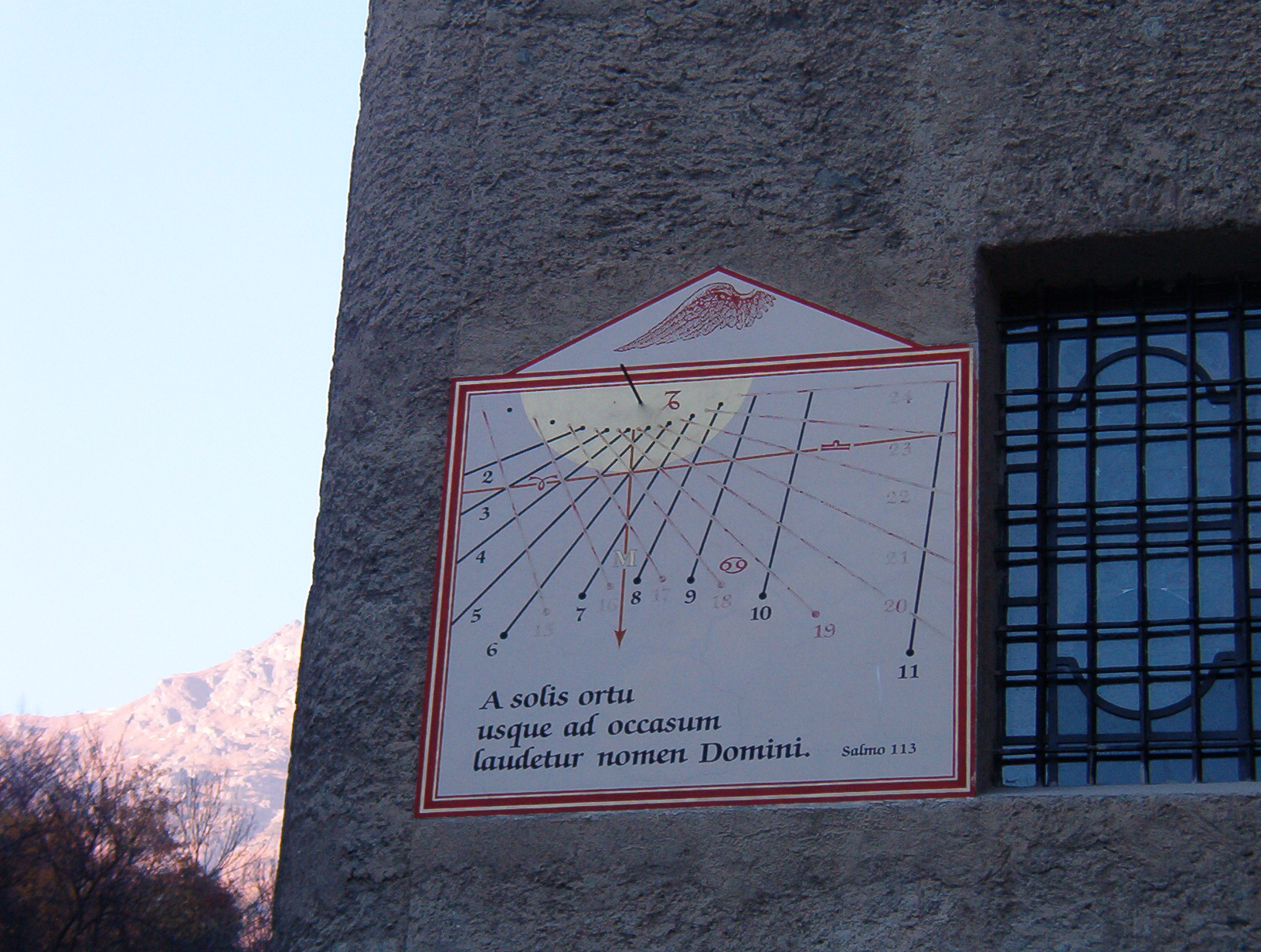 meridiana - Ala di Stura - Valli di Lanzo - Piemonte - Italy